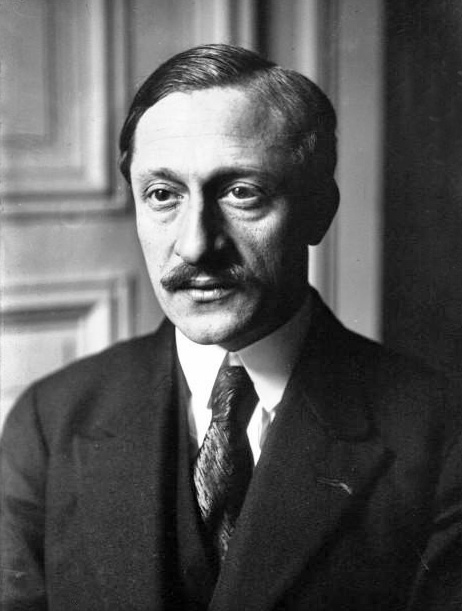 Bokanowski, député : photographie de presse